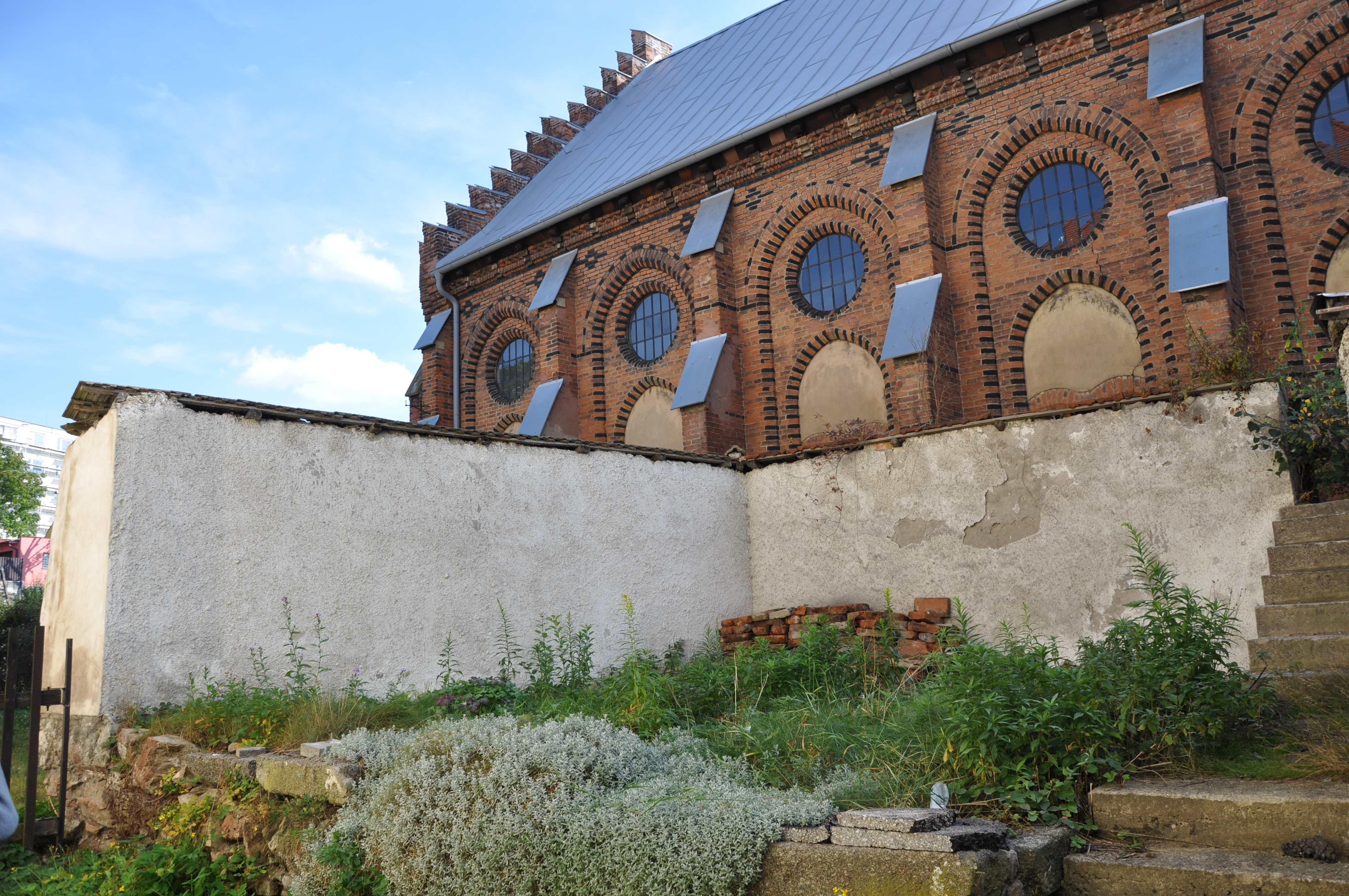 Místo, kde stávala nejstarší synagoga ve Velkém Meziříčí